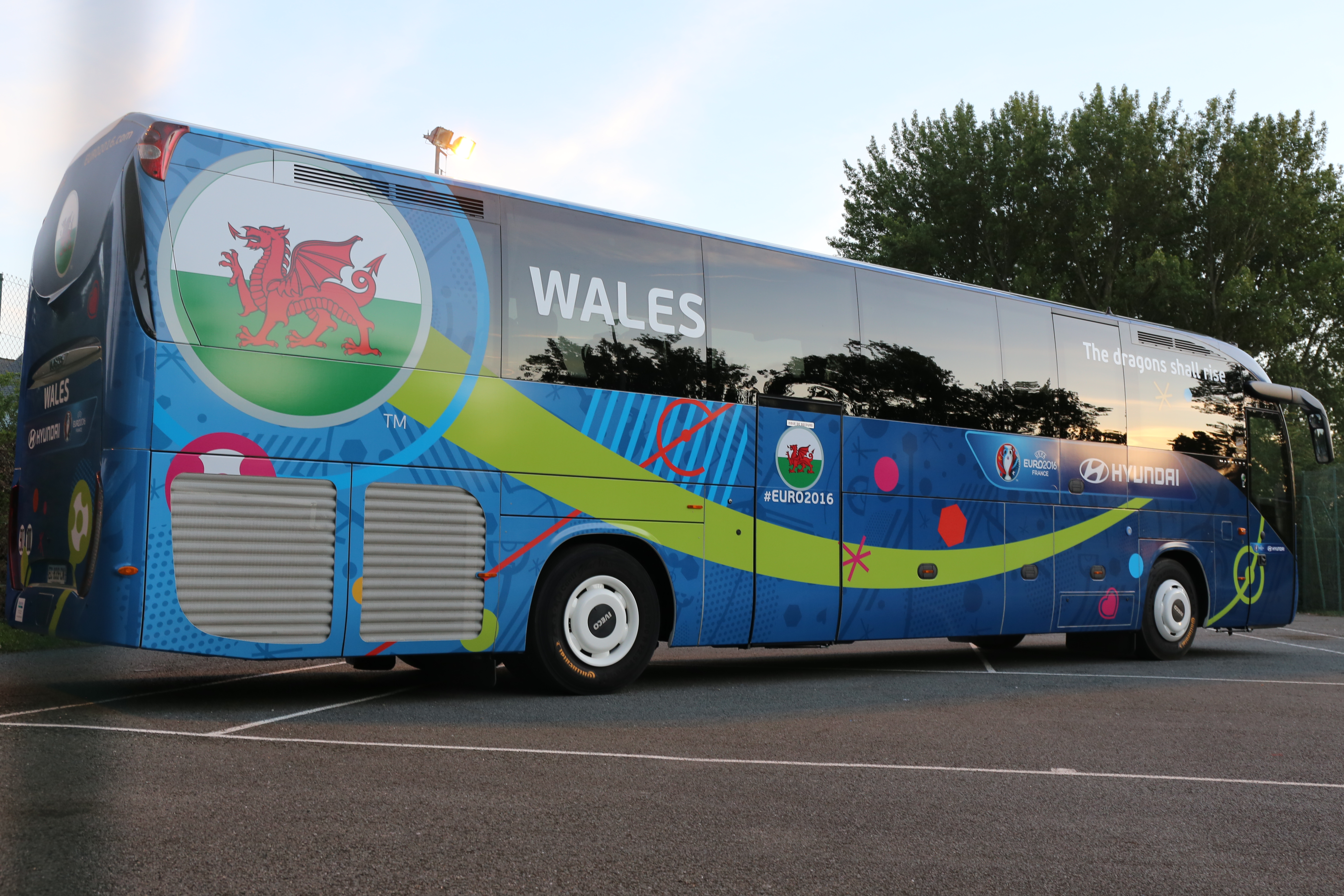 Karr-boutin skipailh mell-droad Kembre e Dinarzh, lec'h annez ar strollad e-pad Euro 2016.